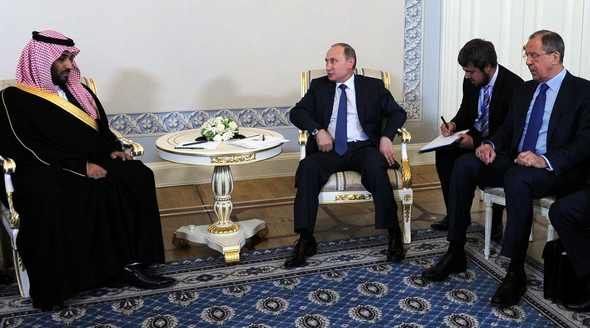 Встреча Президента России Владимира Путина с заместителем Наследного принца, Министром обороны Саудовской Аравии Мухаммедом бен Сальманом cropped